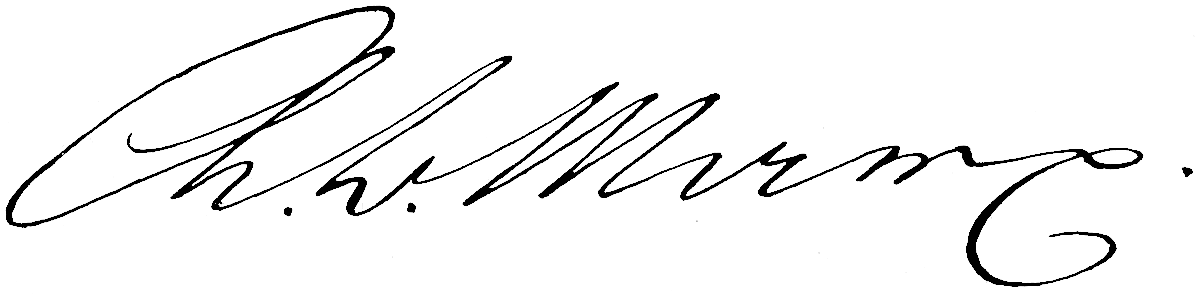 Unterschrift von Adolph Bernhard Marx